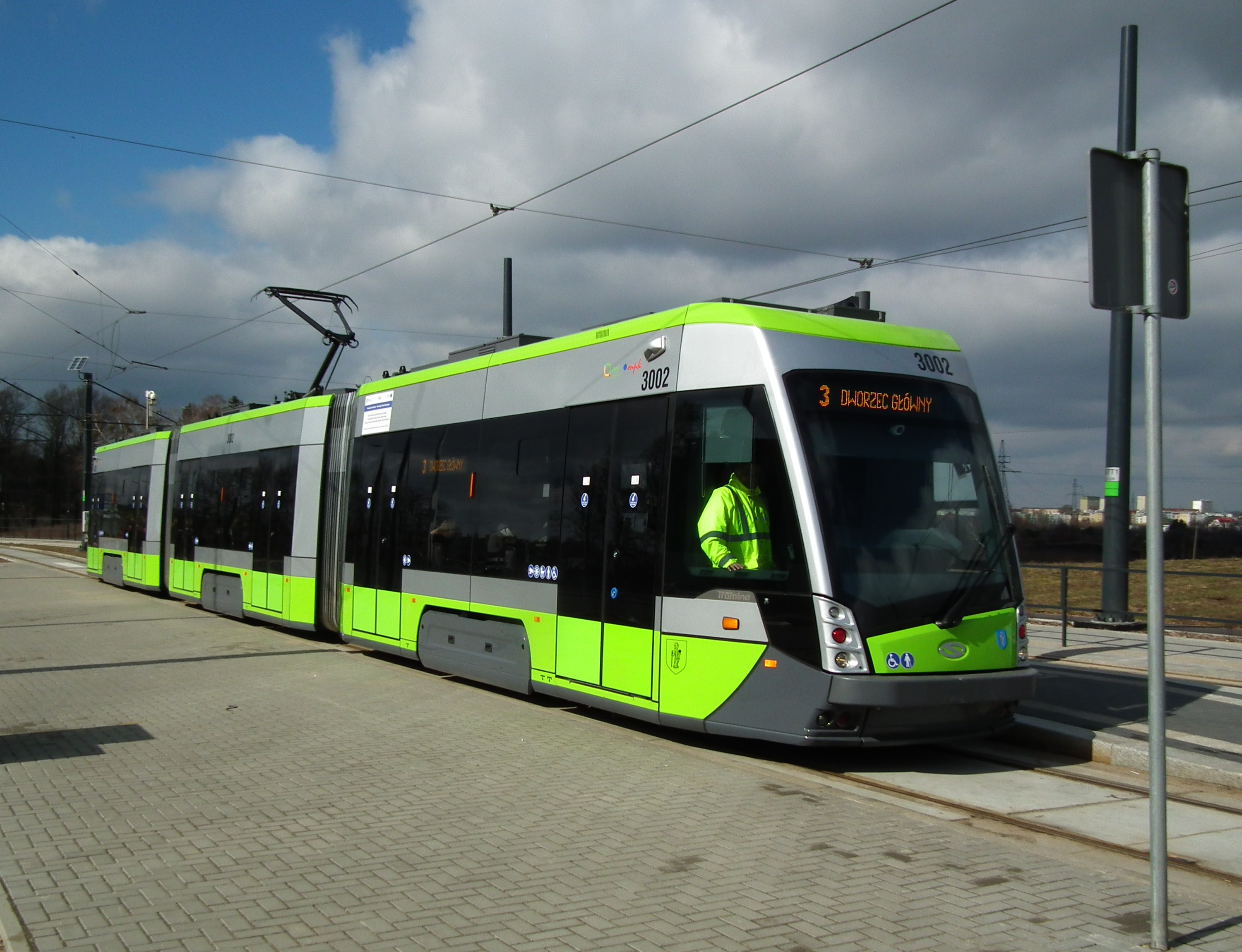 Tramwaje olsztyńskie A.D. 2016.